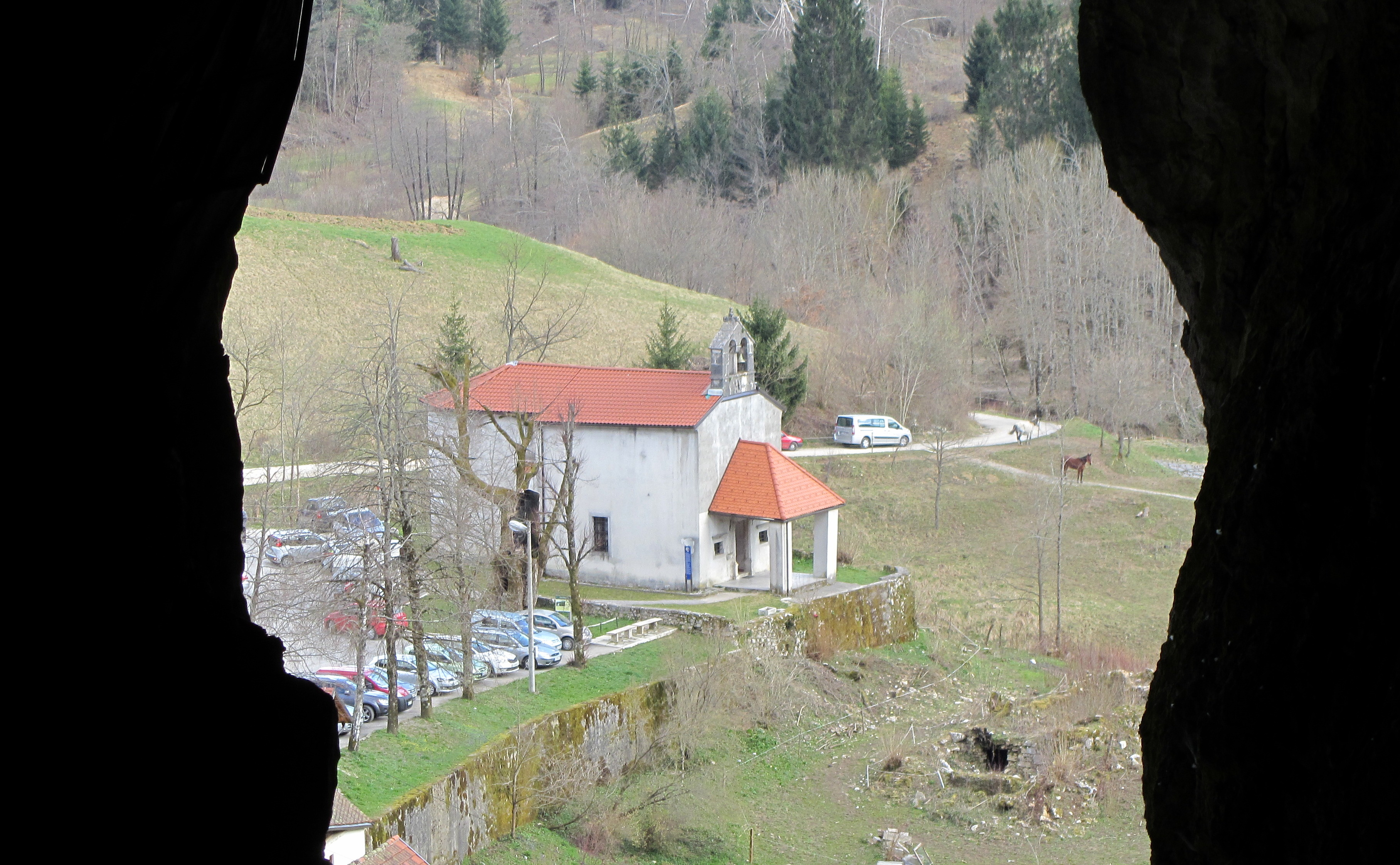 Slovenia, Predjama Castle 21